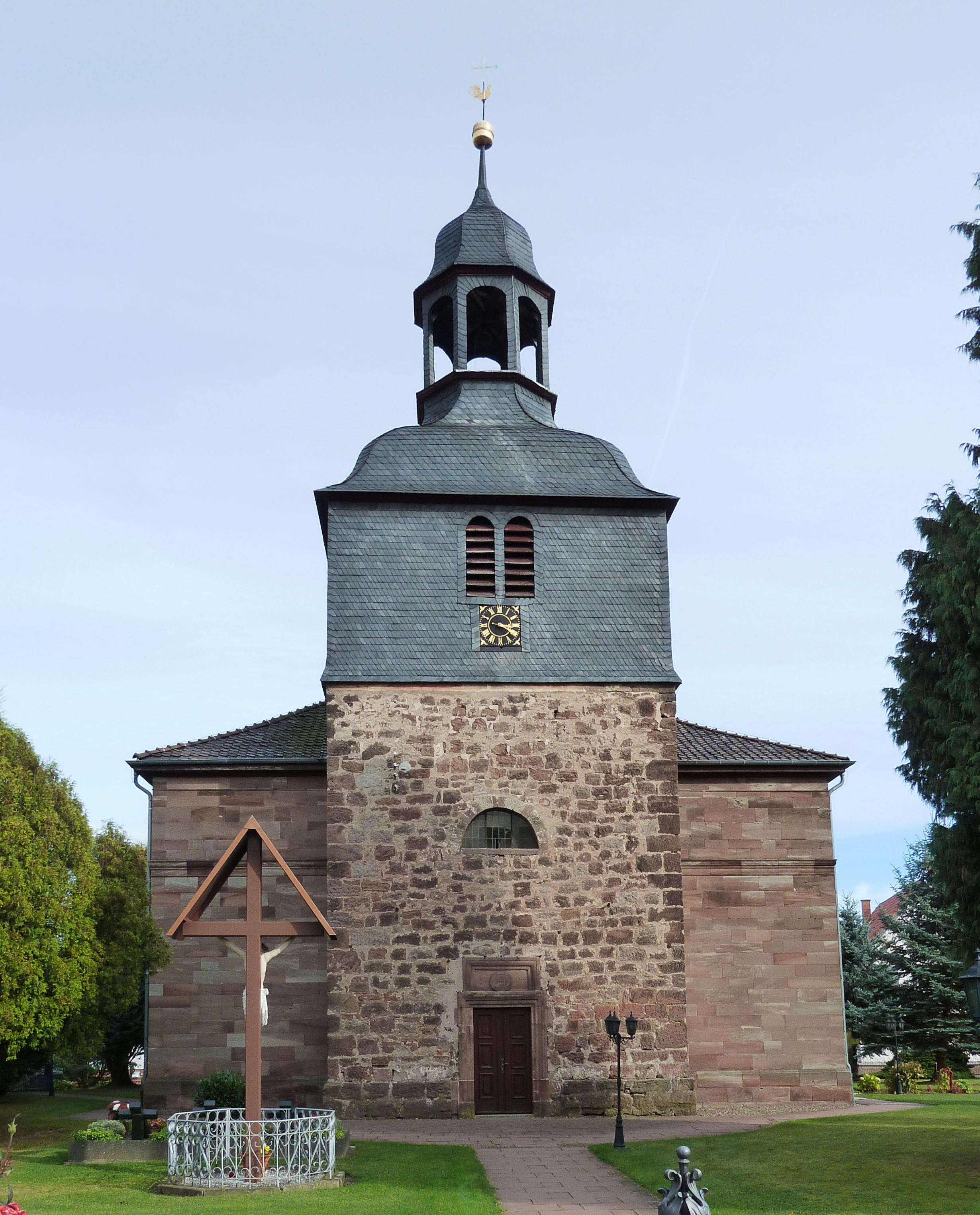 Katholische Pfarrkirche St. Bartholomäus in Hohengandern, Landkreis Eichsfeld. Erbaut 1850, Turm von 1597.